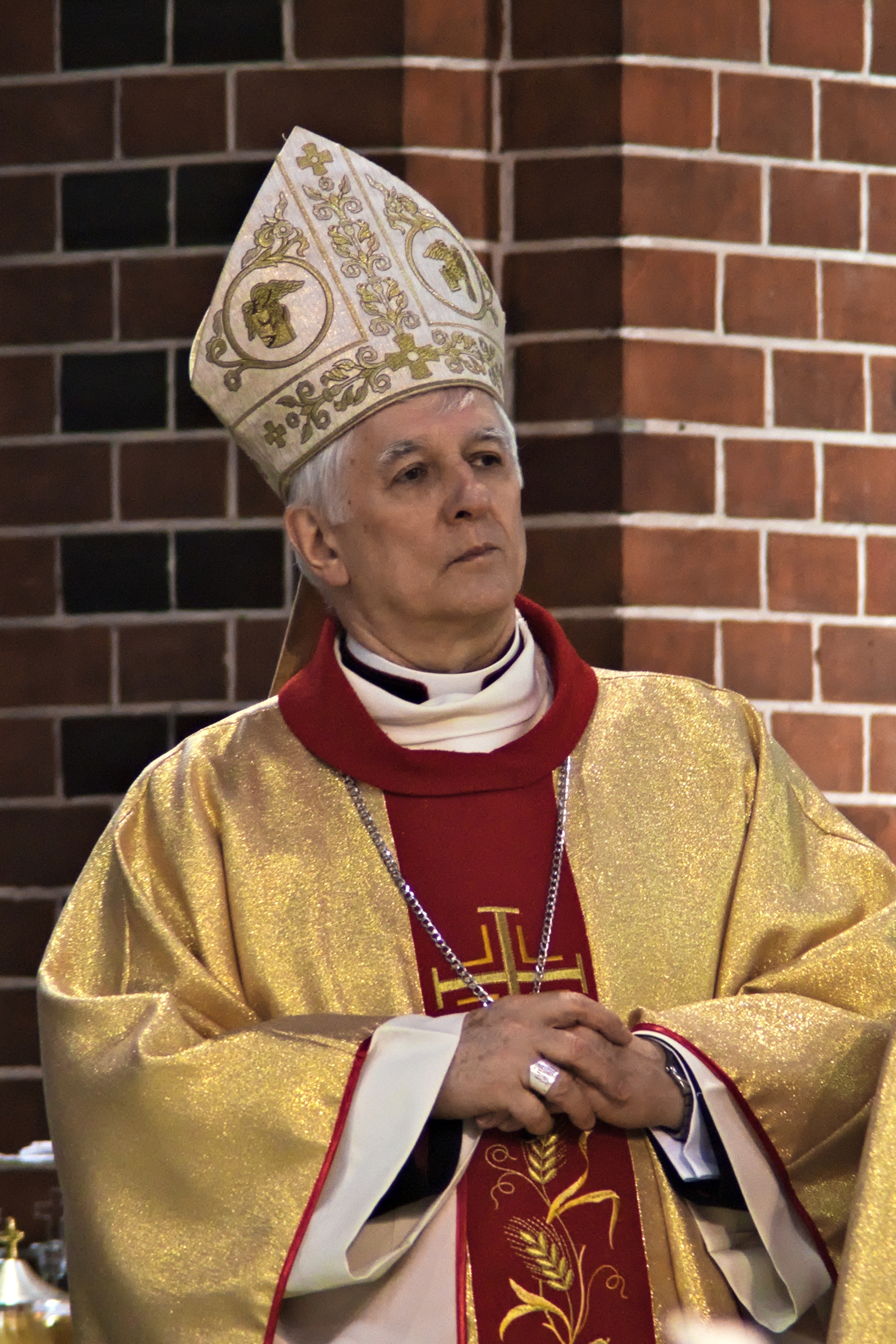 Marek Szkudło (1952– ) biskup pomocniczy katowicki na uroczystej mszy świętej, podczas której świętowano 85. rocznicę urodzin biskupa seniora Jana Wieczorka w katedrze Świętych Apostołów Piotra i Pawła w Gliwicach